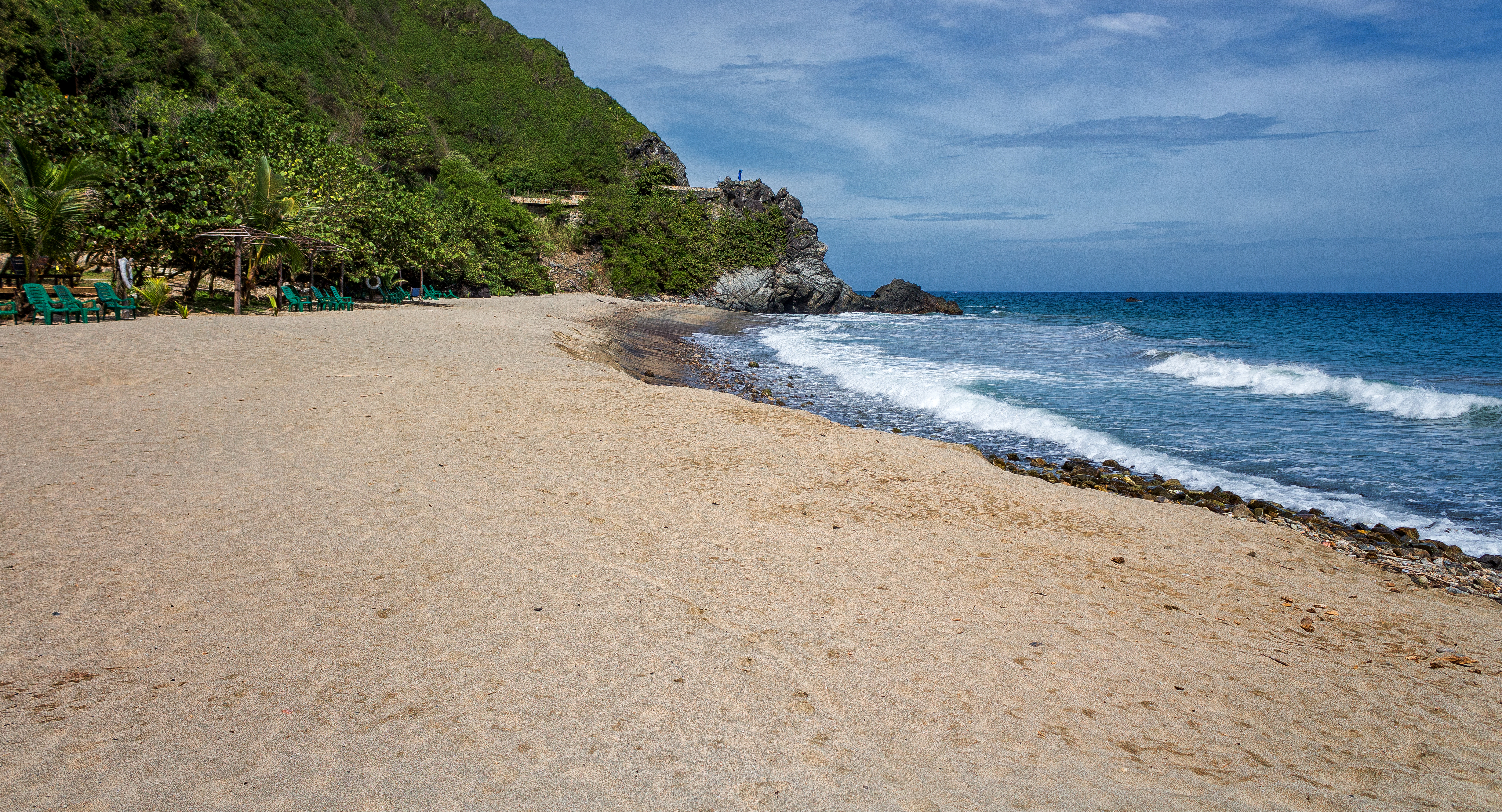 Osma - Edo. Vargas